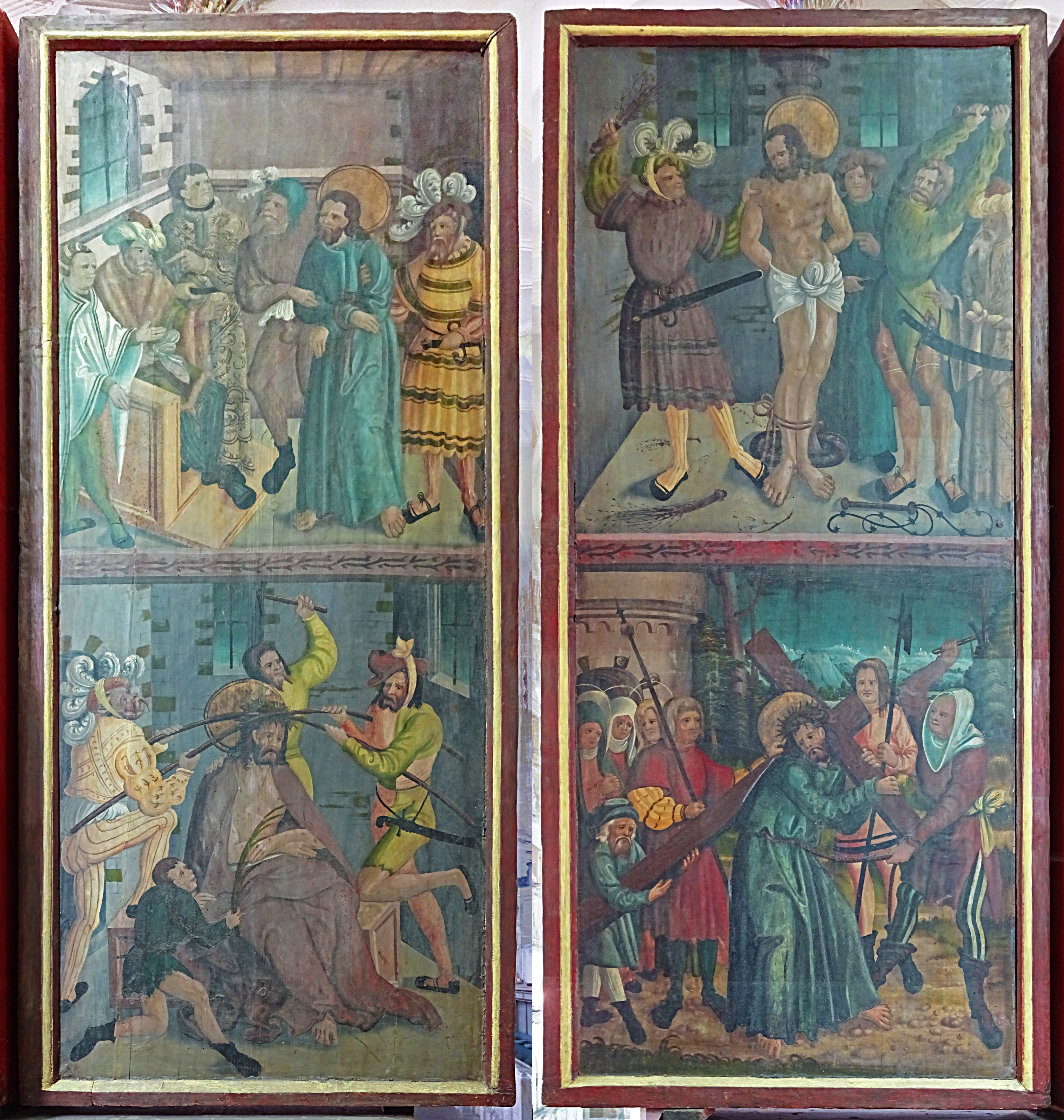 Werktagsseite (Fotomontage) des gotischen Flügelaltars in der St.Annen-Kirche (Eisleben)